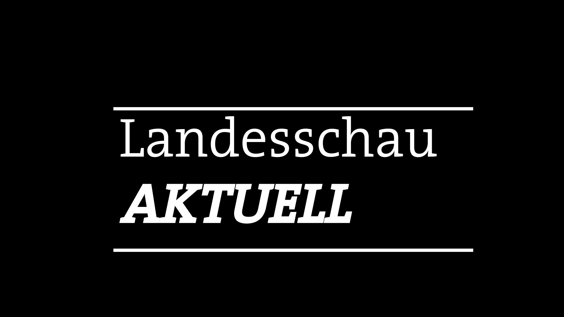 Landesschau AKTUELL Logo. Die verwendete Schriftart ist "The Serif".